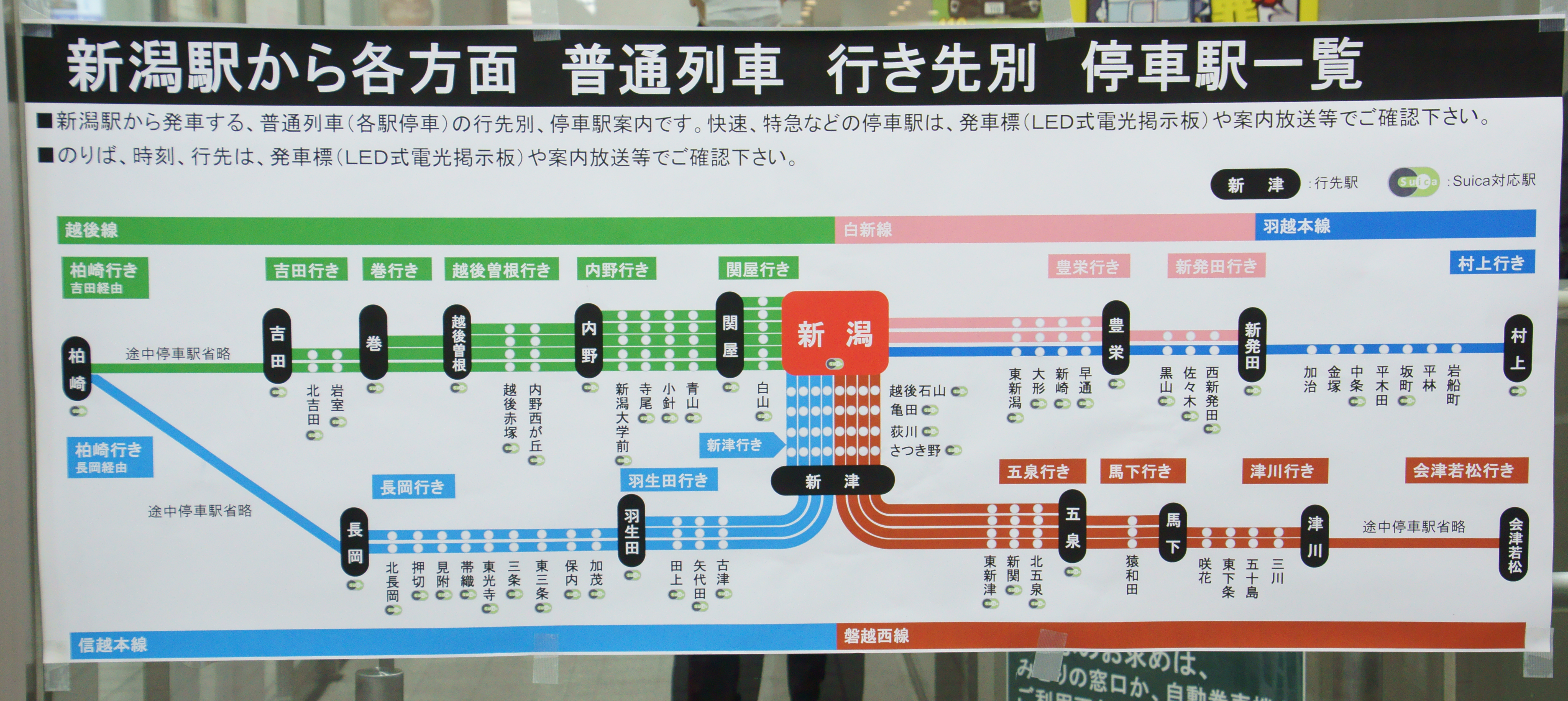 万代口改札に掲示されている案内図（2016年12月）